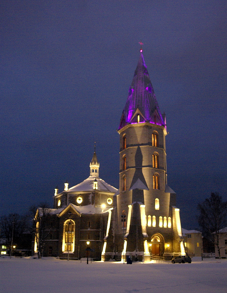 Valgustatud Narva Aleksandri Suurkirik.